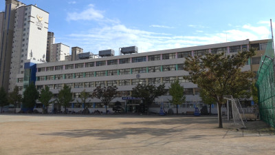 학교정면수정03